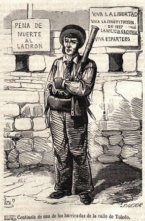 Centinela de una de las barricadas de la calle de Toledo, en la revista española La Ilustración.